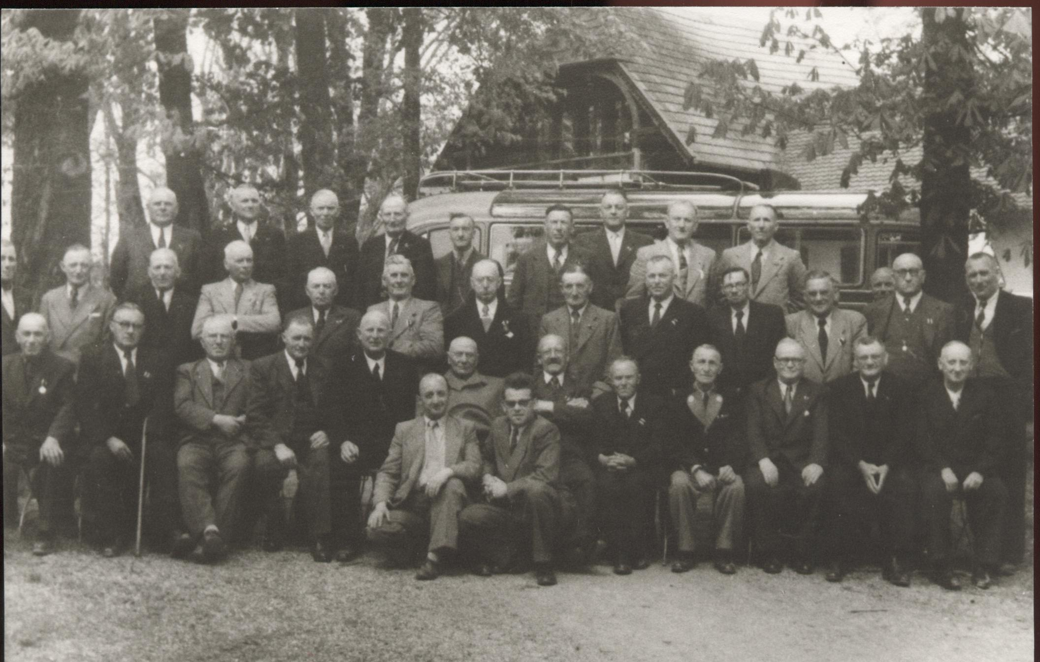 Fritz Bengel Dirmstein, eigener Scan vom eigenen Originalbild im eigenen Besitz